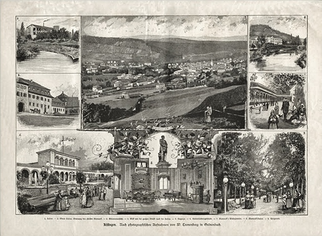 Holzstich (1885) mit verschiedene Ansichten aus Bad Kissingen "nach photographischen Aufnahmen von W. Cronenberg in Grönenbach"